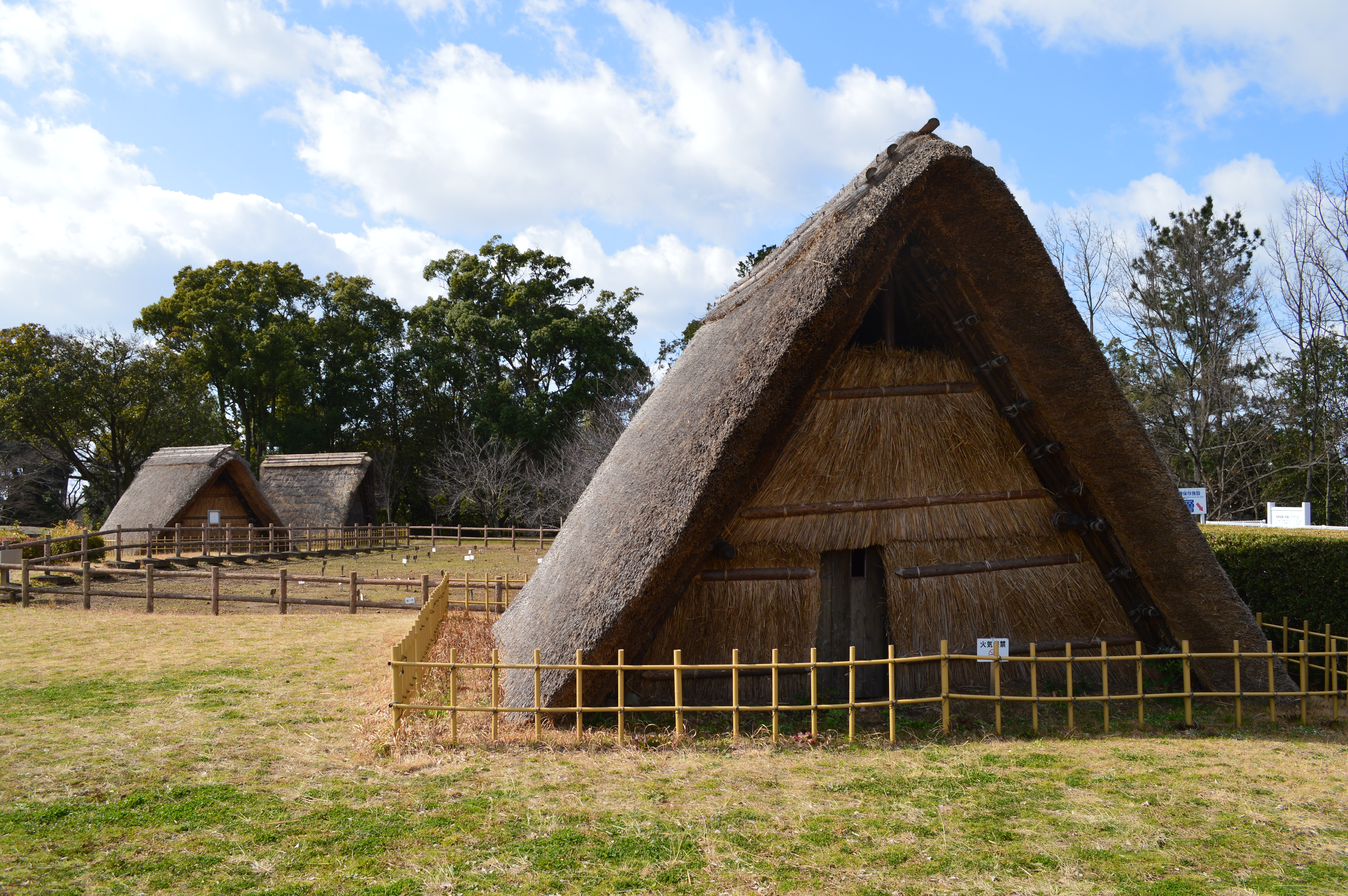 蜆塚遺跡 復元建物